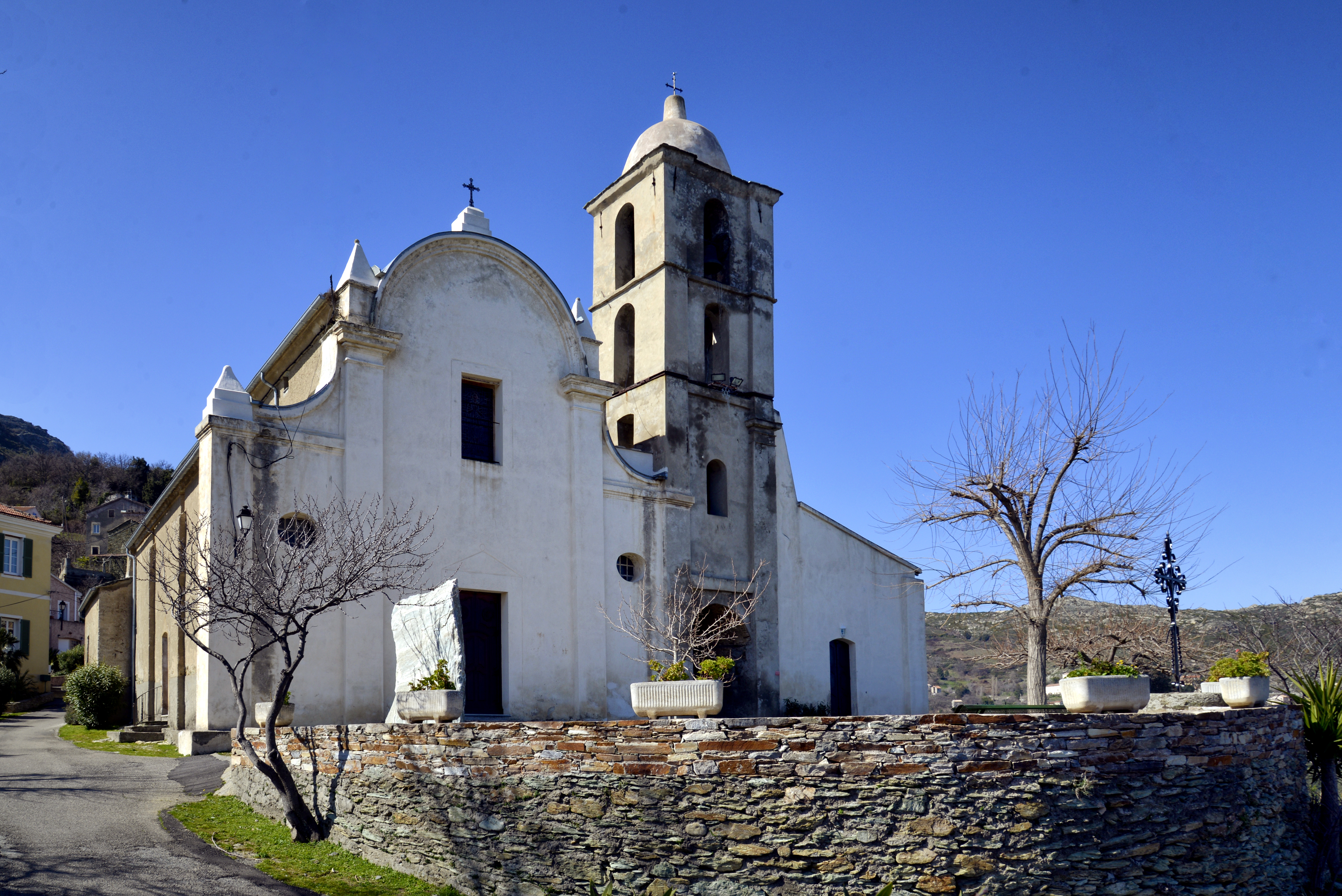 San-Gavino-di-Tenda, Nebbio (Corse) - Église paroissiale San Gavinu